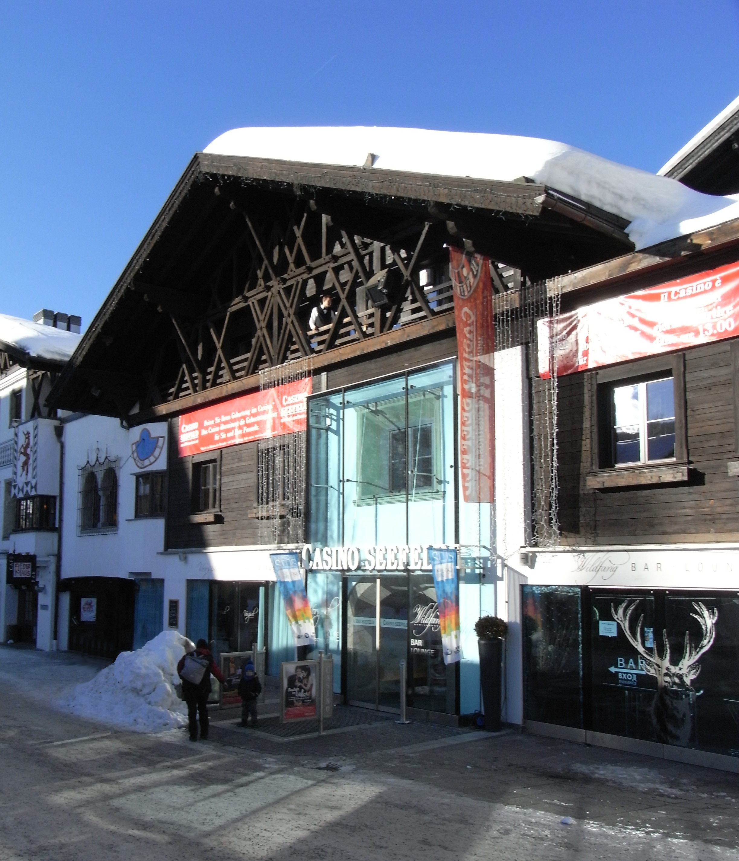 Seefeld in Tirol, Spielkasino (Casinos Austria AG)